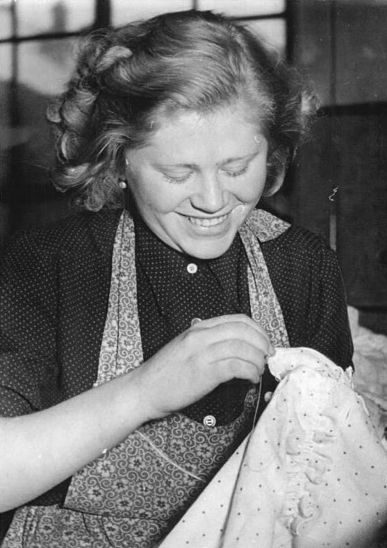 Zentralbild-TBD-Torka Str.-Sta. 13.2.1954 Massnahmen zur Förderung der Jugend in den volkseigenen Thüringer Bekleidungswerken in Erfurt. Im VEB Thüringer Bekleidungswerk, Erfurt, wird die 3. Anordnung zum Gesetz zur Förderung der Jugend eifrig diskutiert, da ein grosserTeil der Näherinnen Jugendliche sind. Aber auch die älteren Kolleginnen beiteiligen sich an diesen Gesprächen. UBz: Die 19jährige Jugendfreundin Christel Peter hat Schneiderin gelernt. Sie besucht die Volkshochschule, um sich beruflich weiterzuentwickeln. Sie freut sich ebenfalls über die weiteren Massnahmen zur Förderung der Jugend. "Uns stehen wiklich alle Wege offen, um uns zu qualifizieren. Es hängt nur von den Leistungen und den Fähigkeiten jedes Einzelnen ab", sagt Christel Peter, und nicht mehr vom Geld der Eltern. Dafür sorgt unsere Regierung und wir sind ihr sehr dankbar dafür." und nicht mehr vom Geld der Eltern. Dafür sorgt unsere Regierung und wir sind ihr sehr dankbar dafür."-Christel Peter beim Aufbessern von Nähten.